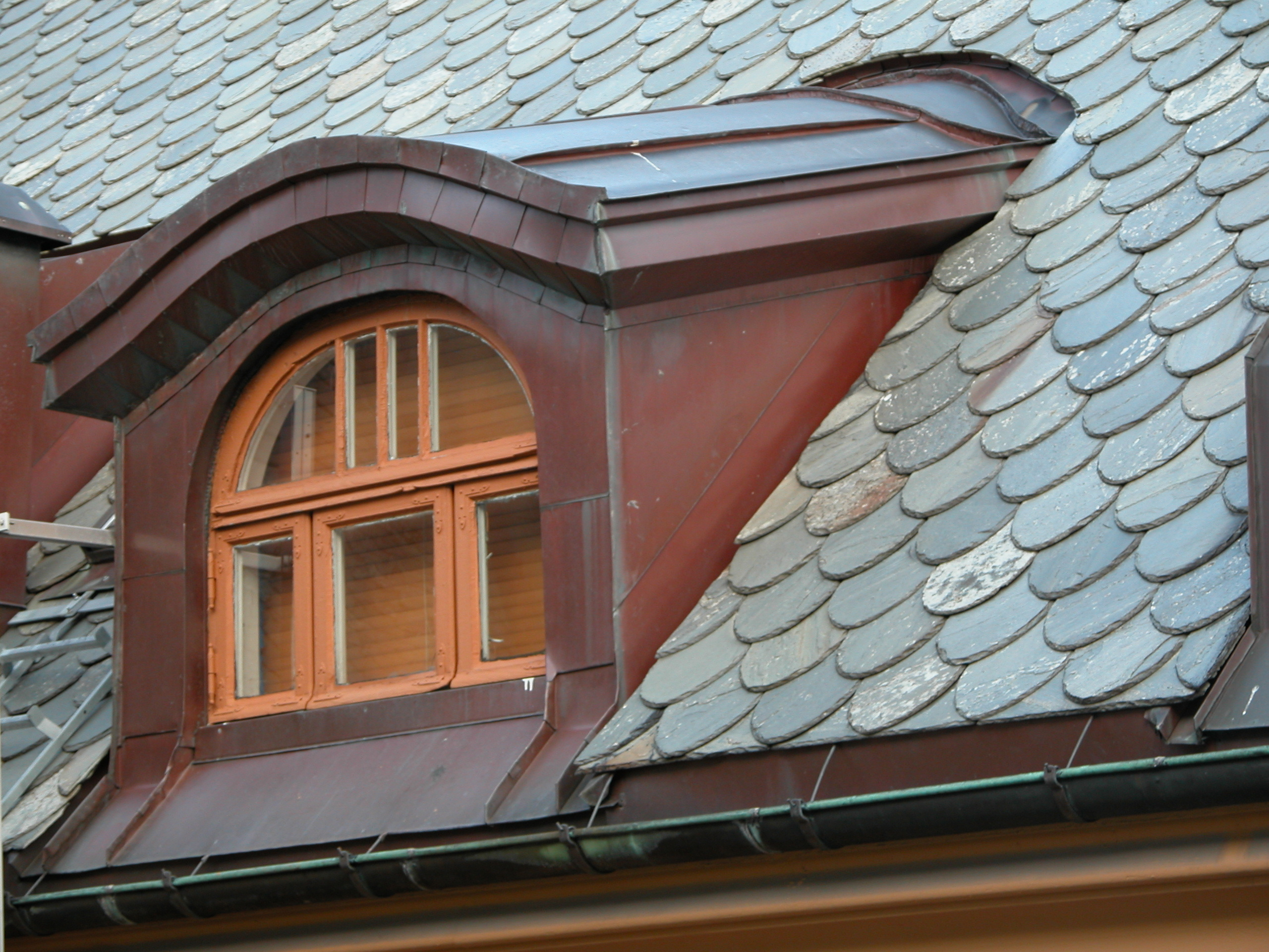 Eksempel på Kobbhus